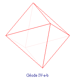 Géodes à base d'octaèdre : étape 1 de la construction